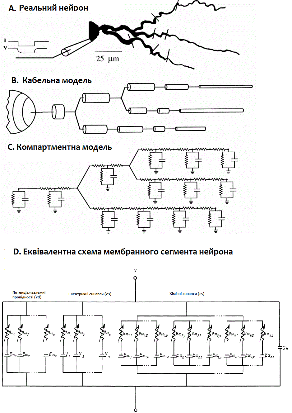 Реальний нейрон,кабельна і компартментна моделі, еквівалентна схема.